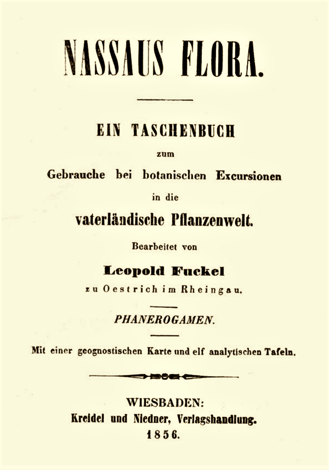 Leopold Fuckel: Nassaus Flora. Ein Taschenbuch zum Gebrauche bei botanischen Excursionen in die vaterländische Pflanzenwelt. Phanerogamen, Verlag Kreidel und Niedner, Wiesbaden 1856, 11 Tafeln, 1 geognostische Karte